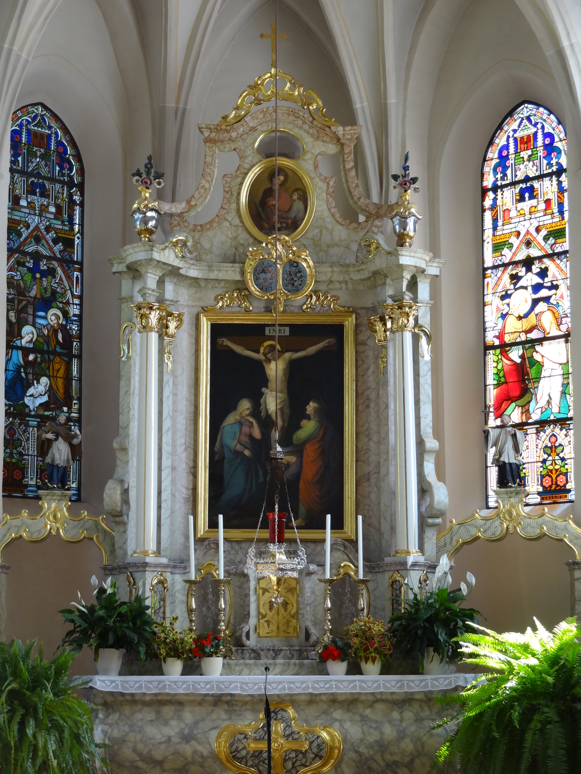 Hochaltar (Kreuzaltar) der kath. Pfarrkirche St. Johann Baptist in Binabiburg (Gde. Bodenkirchen, Lkr. Landshut, Bayern)